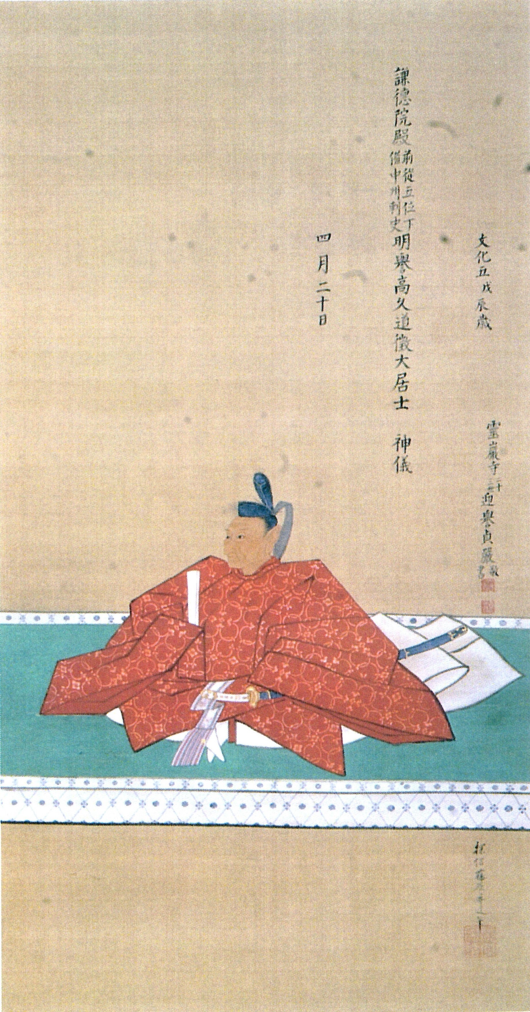 京極高久の肖像。